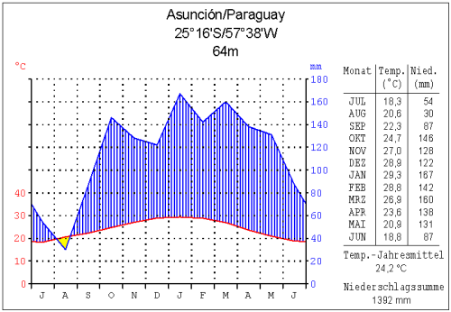 Klimadiagramm Asuncion